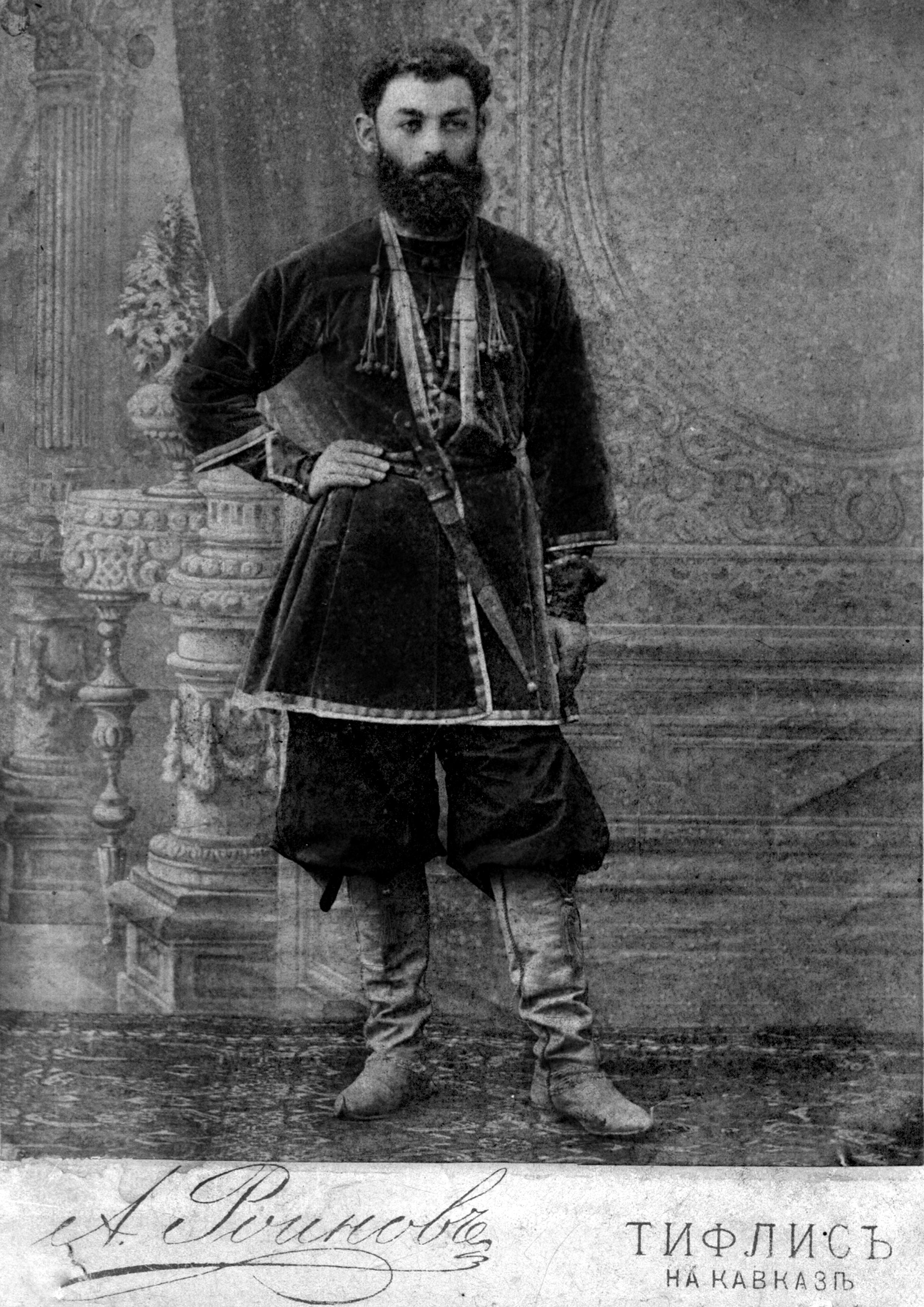 ლადო აღნიაშვილი